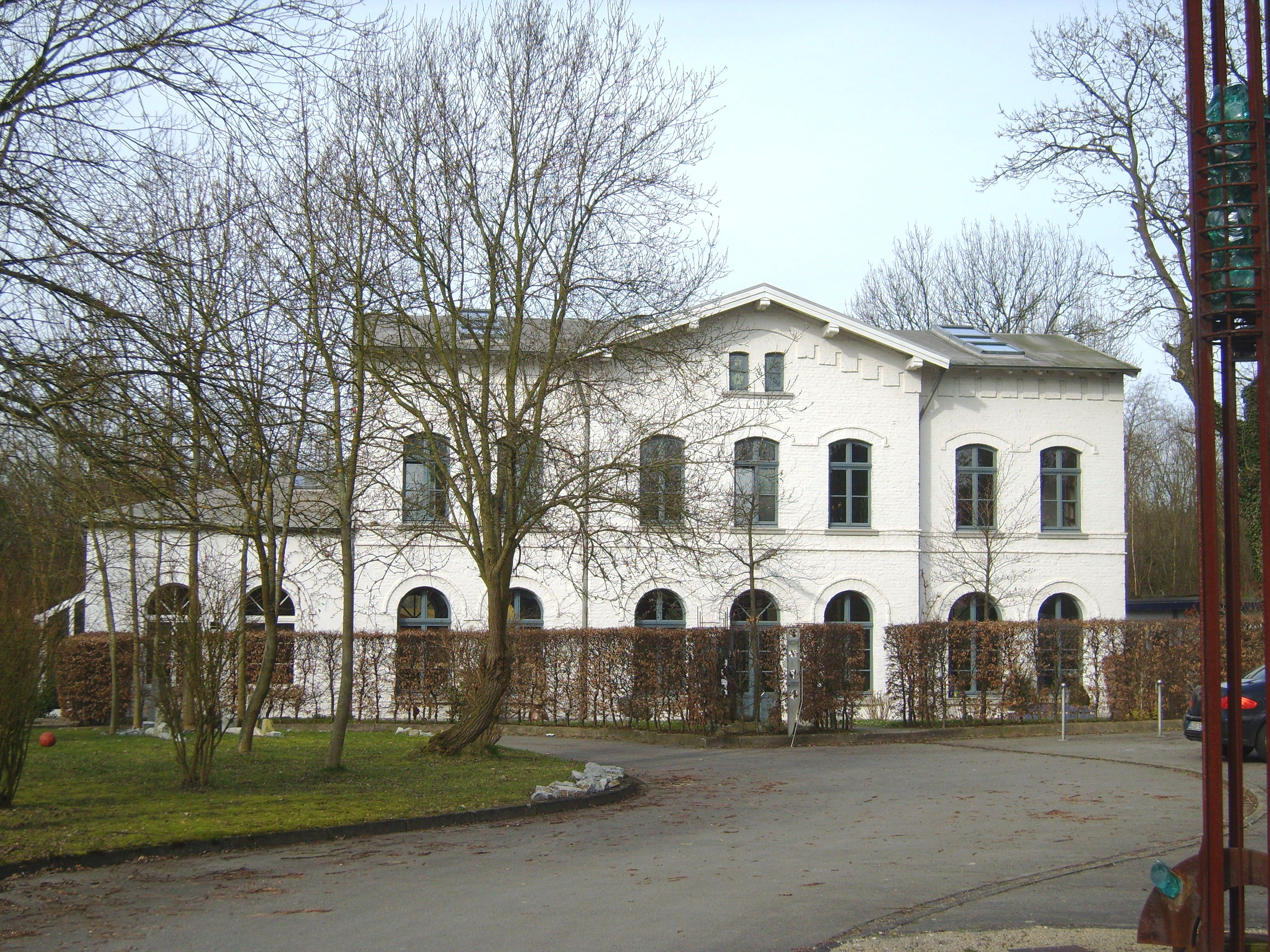 Bahnhof Mariagrube beim Alsdorfer Stadtteil Mariadorf.